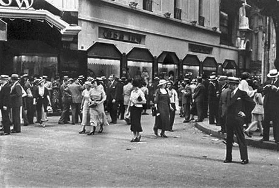 Calle Florida esquina Cangallo, actual Tte. Gral. Juan Domingo Perón, Buenos Aires, en 1936. Se ve atrás la Casa Tow.